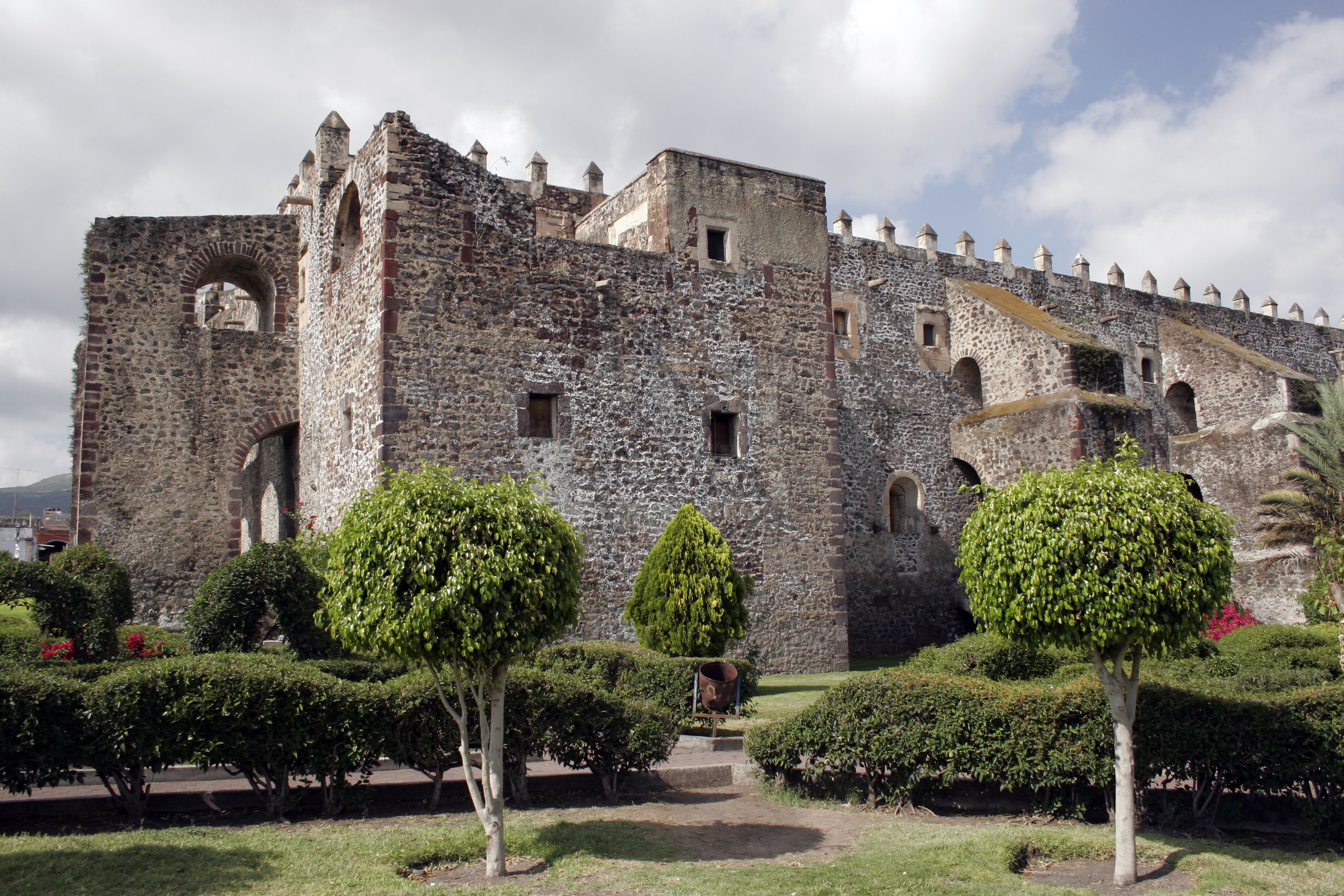 Convento de San Agustín de Yuriria, fundado en 1550 por los Agustinos, Yuriria, Guanajuato, México - San Agustín de Yuriria Convent, founded by the Agustines in 1550, Yuriria, Guanajuato, Mexico